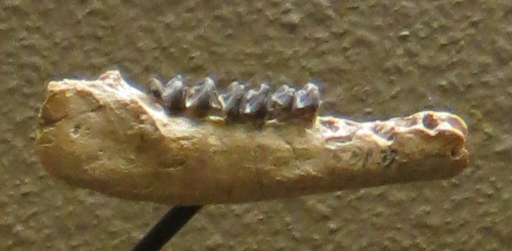 Fossil of Dacrytherium - Took the picture at Natural History Museum, Basel